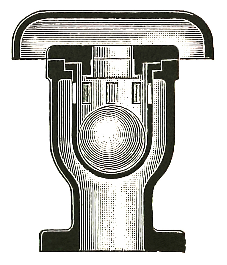 Luftventil, Entlüftungsventil einer Wasserleitung Das Ventil sei an der höchsten Stelle der Wasserleitung, die Kugel schwimme im Wasser. Befindet sich Luft in der Leitung, strebt sie an den höchsten Punkt. Sie kommt von unten in das Luftventil und durch die rechteckigen Löcher in Berührung mit der Kugel. Die Luft verdrängt das Wasser, wodurch der Auftrieb für die Kugel fehlt und die oben gelegene Öffnung des Ventils freigibt: Die Luft kann entweichen. Durch den Wasserdruck in der Leitung steigt der Wasserpegel, die Kugel wird hochgedrückt und verschließt das Luftventil.